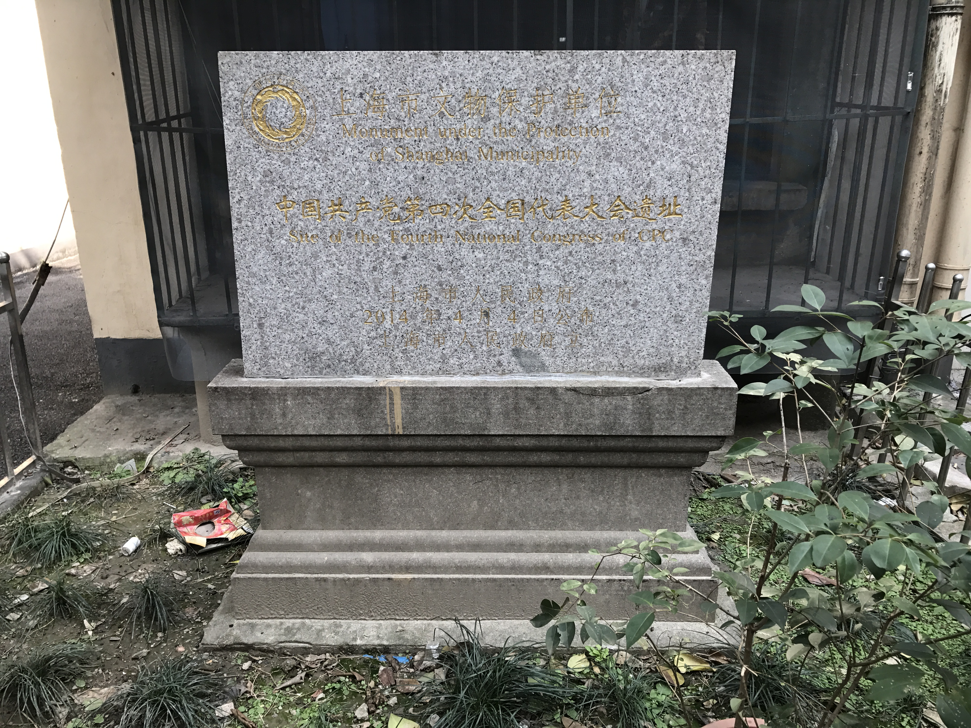 中国共产党第四次全国代表大会遗址 东宝兴路254弄28支弄8号 1925年